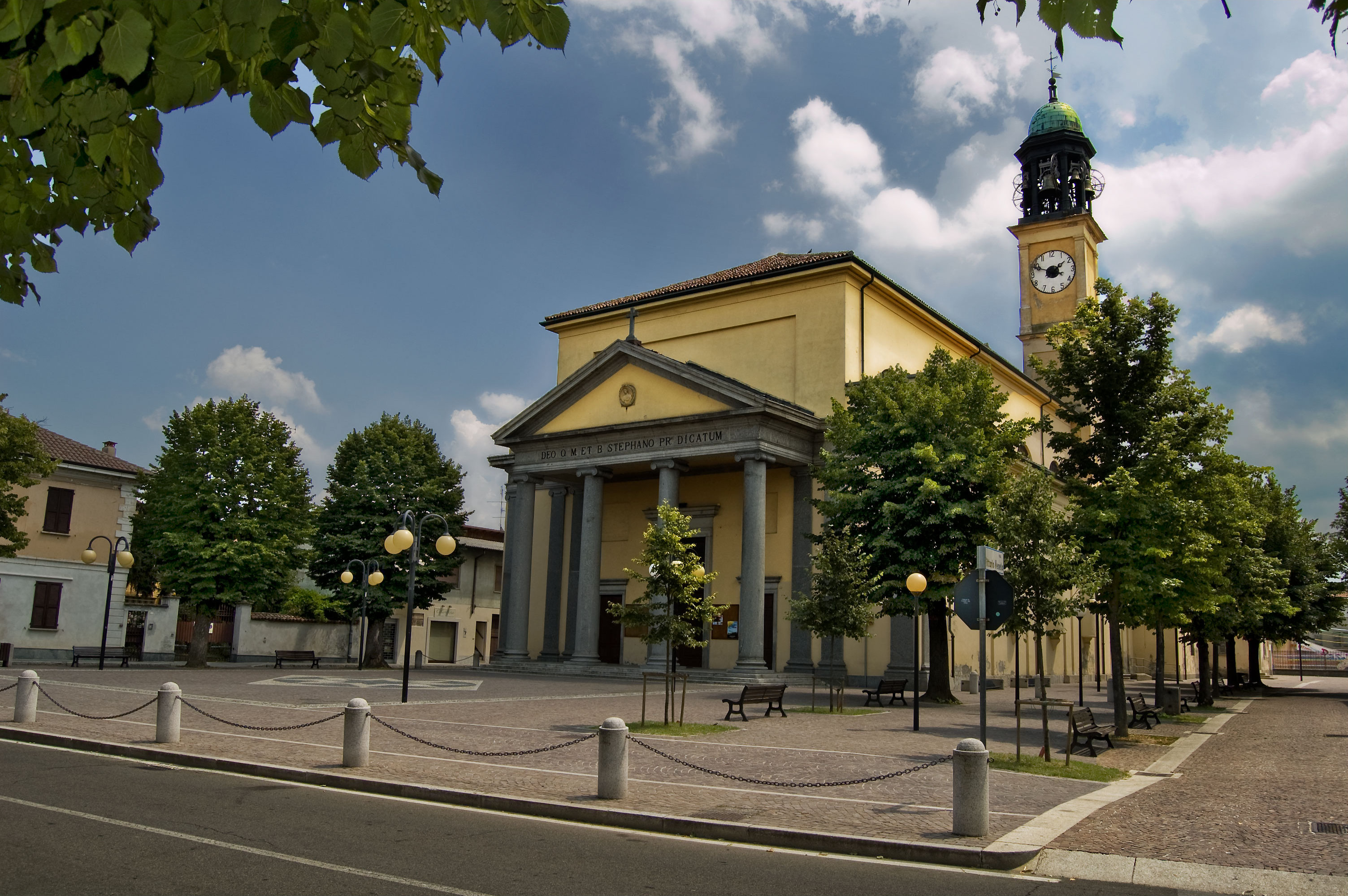 La chiesa di Santo Stefano di Rosate